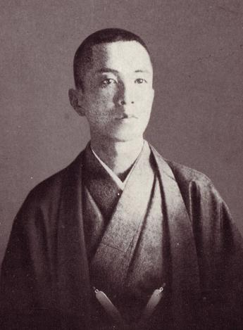 takashinagatsuka